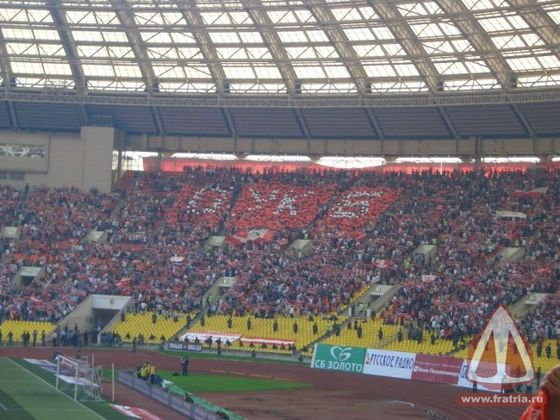 Перфоманс ОУКБ на матче с ЦСКА. 2005 год